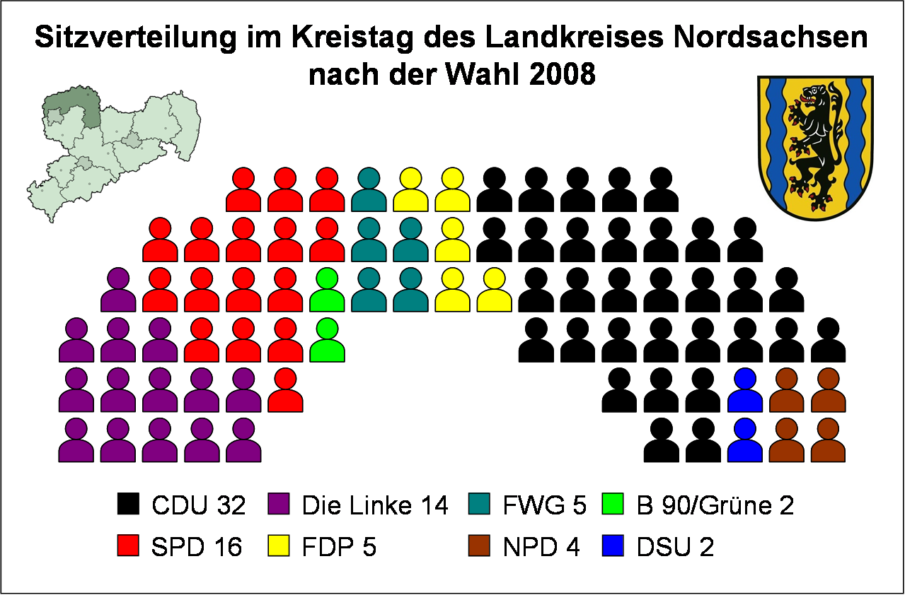 Sitzverteilung im Kreistag des Landkreises Nordsachsen nach der Wahl vom 8. Juni 2008